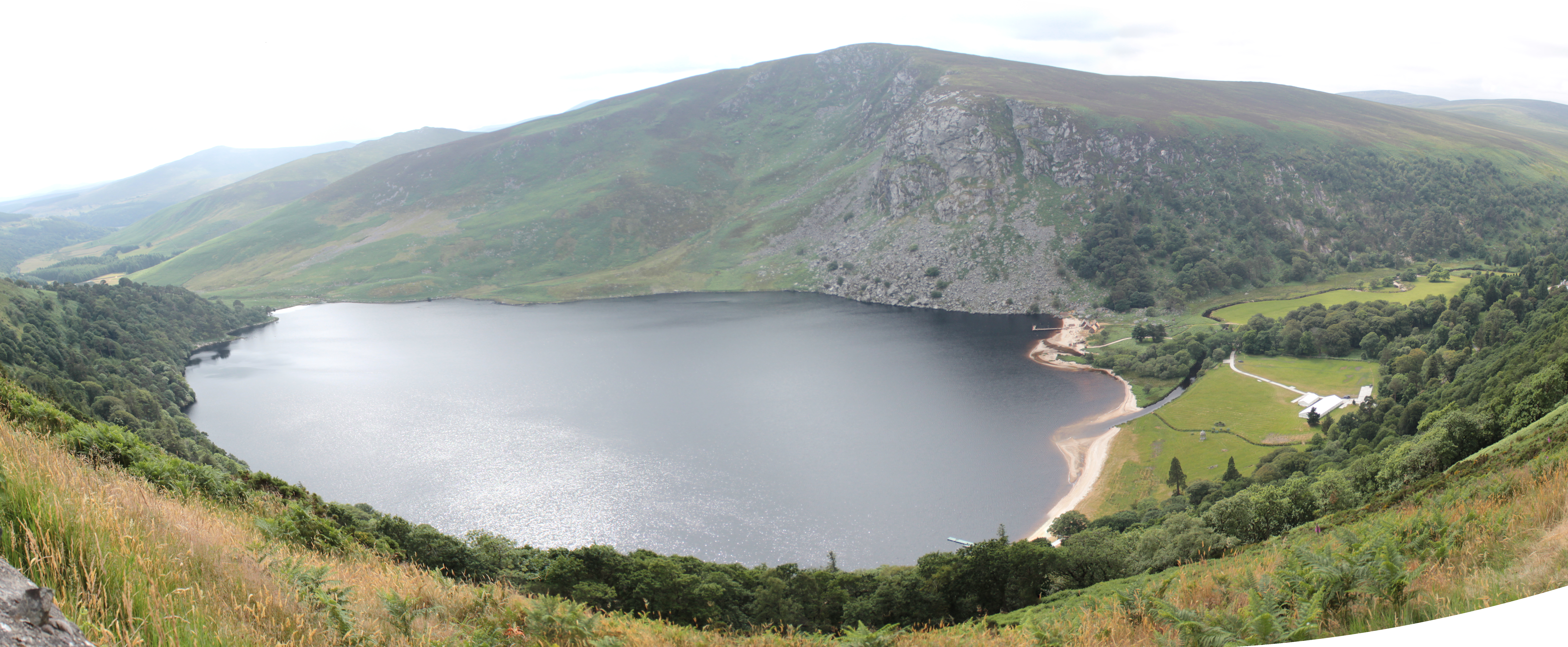 Le lough Tay depuis la RD759, dans le conté de Wicklow en Irlande. Photos prises le 21 juillet 2013, assemblées avec Hugin